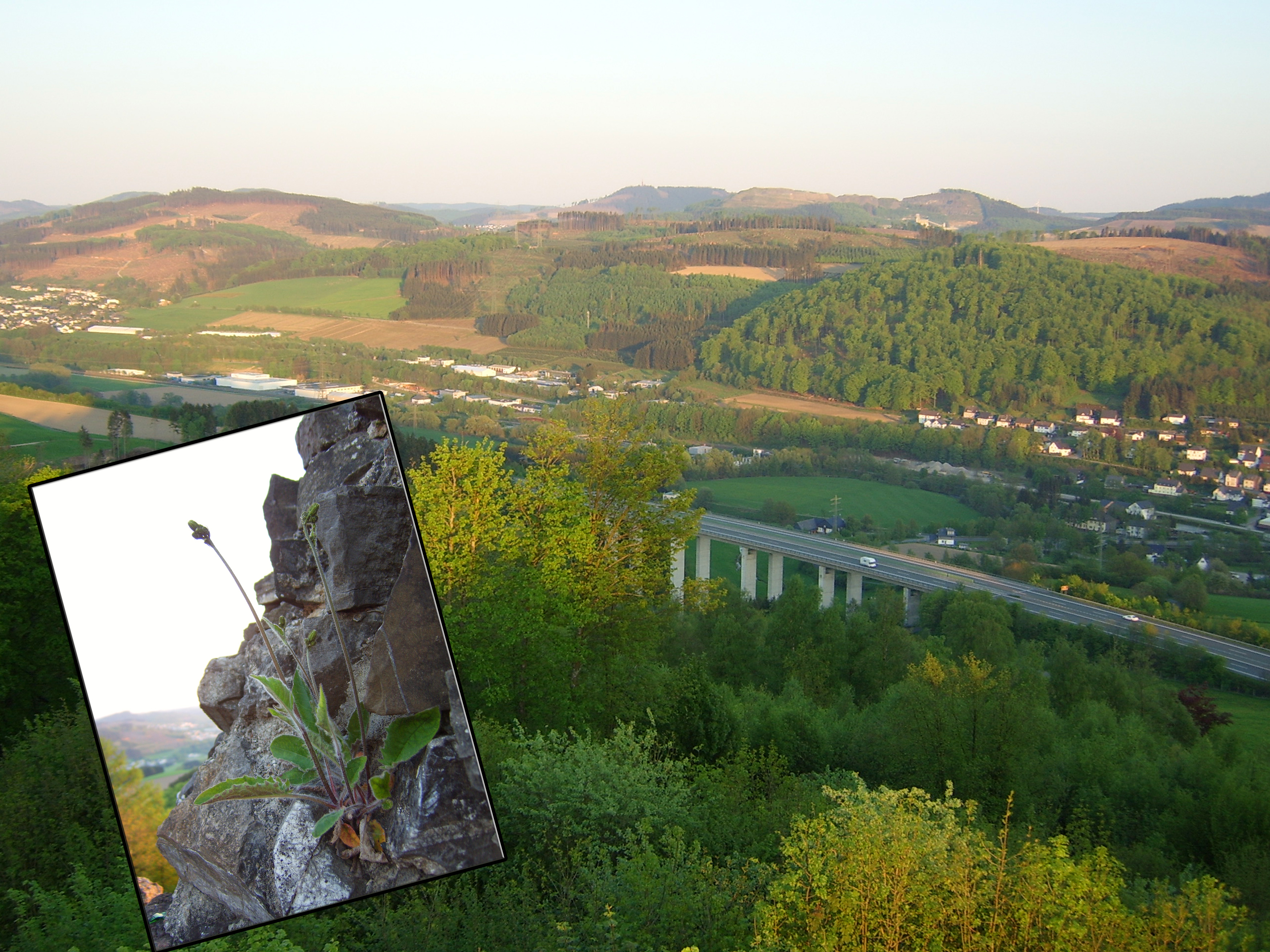 Ruine Everberg; Blick von der Ruine. Links: Makroaufnahme der Vegetation auf der Aussichtsplattform der Ruine; rechts oben erkennbar: Sturmschäden durch Kyrill